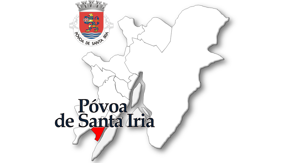 Evolução da População